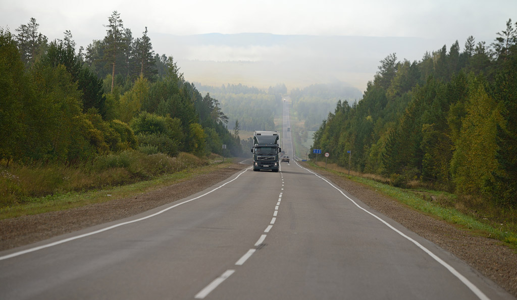 Федеральная автотрасса "Байкал"